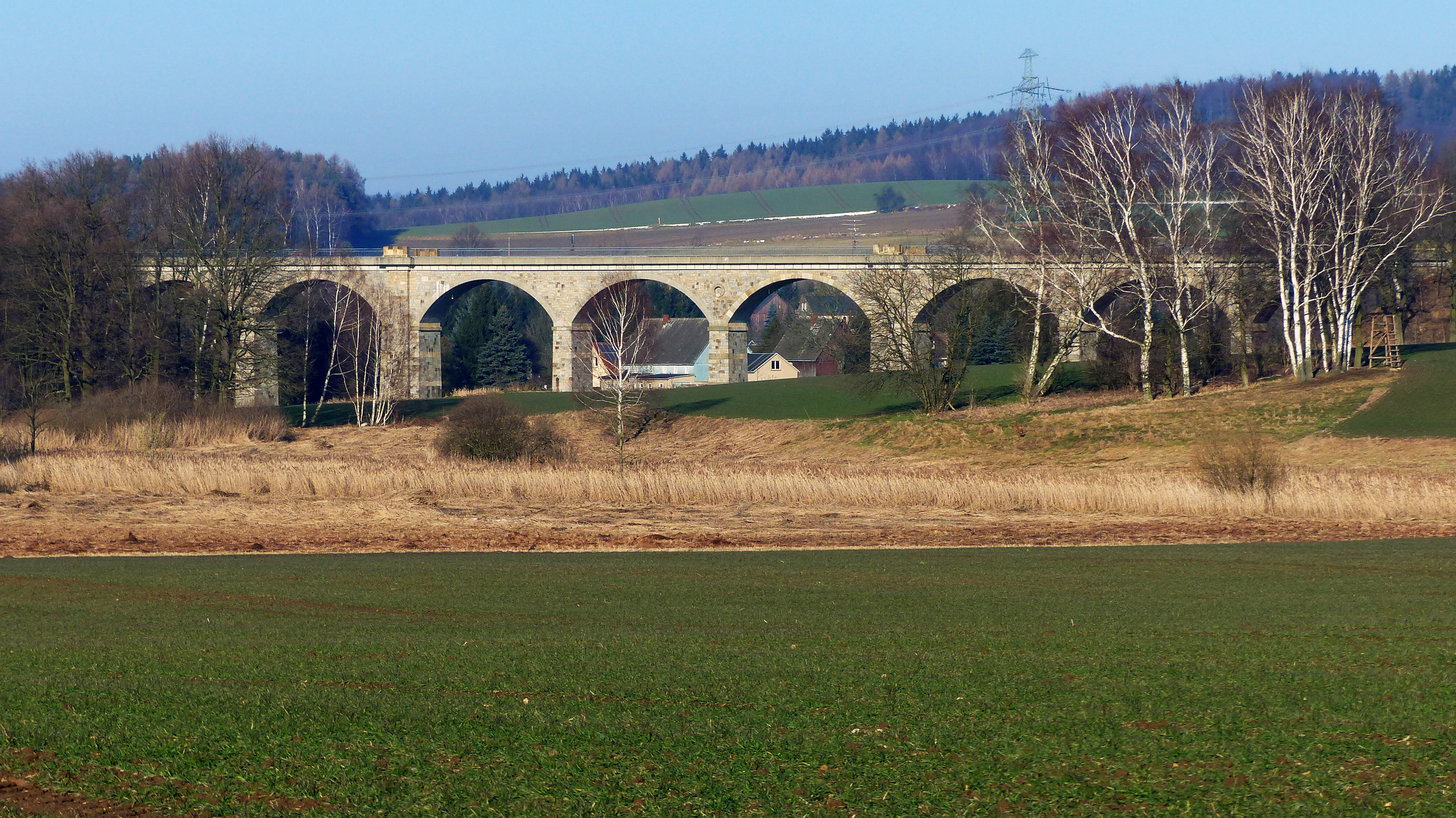 Viadukt Putzkau, Sachsen